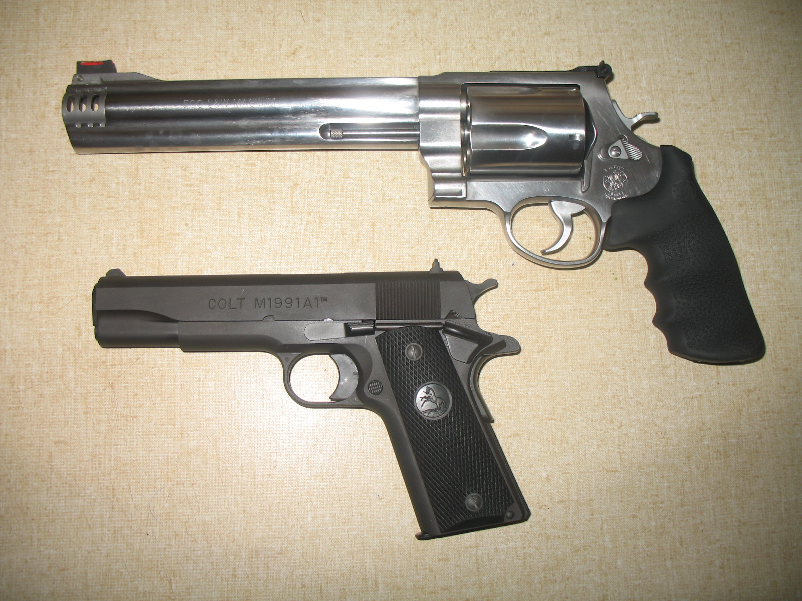 COLT45/S&W500